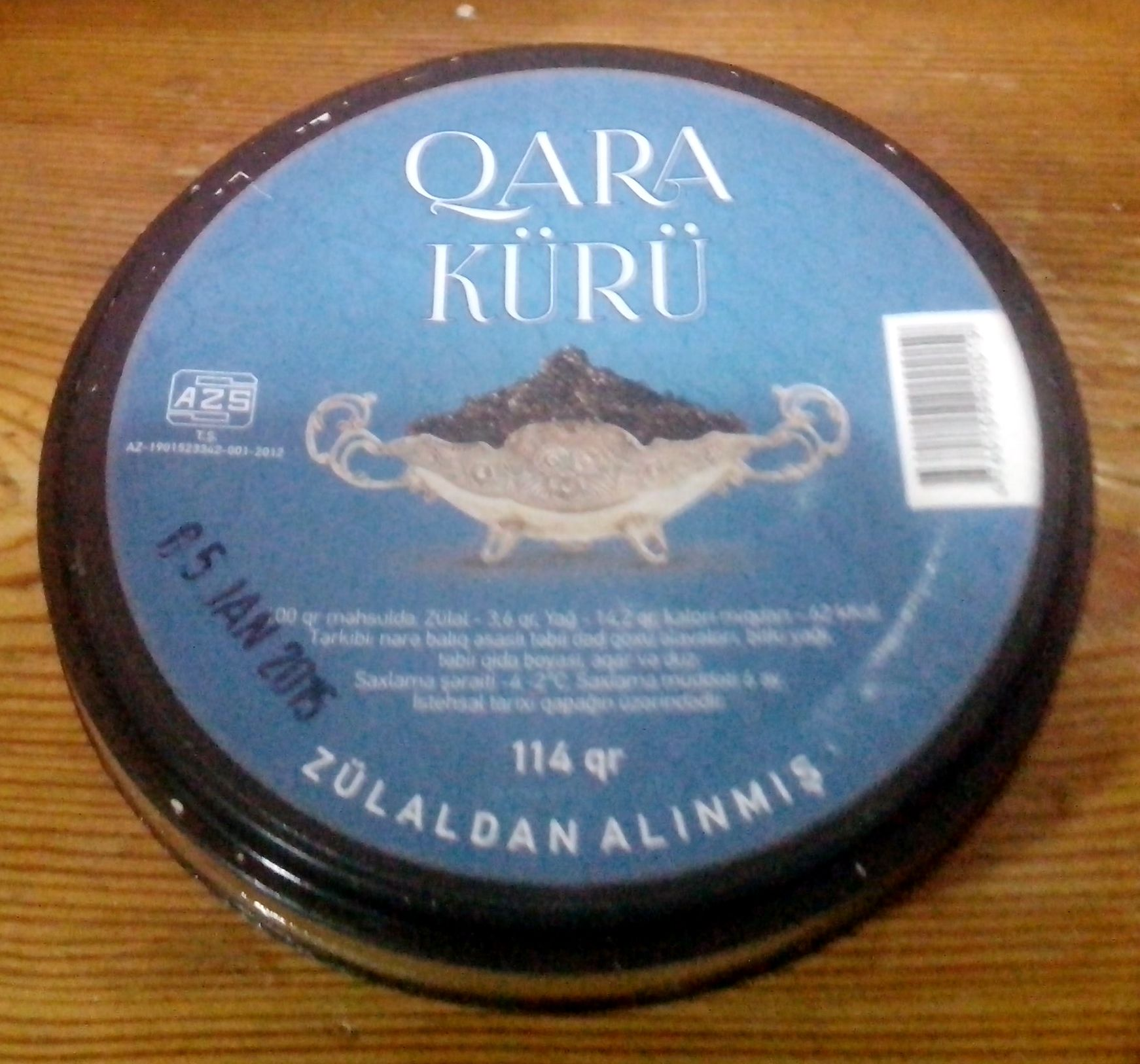 Qara kürü